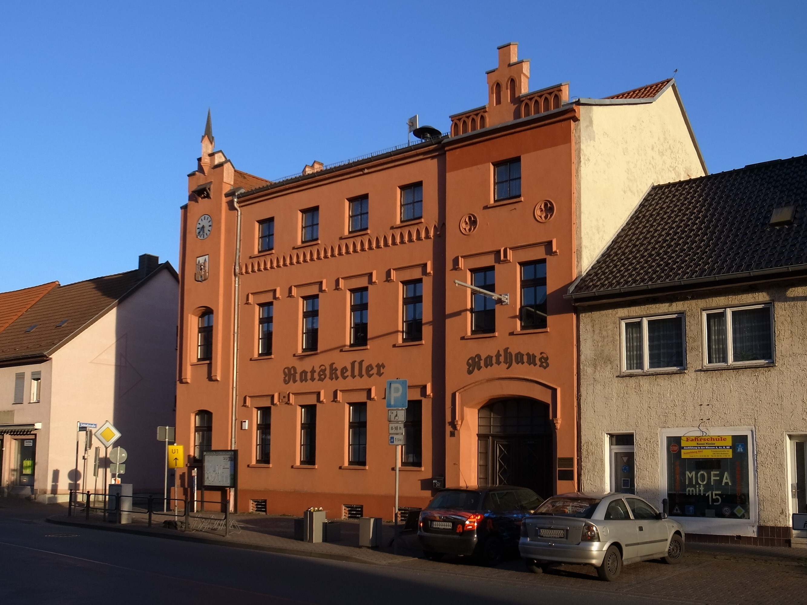 Stadt Raguhn-Jeßnitz. Das Rathaus, Sitz der Stadtverwaltung im Ortsteil Raguhn. [1]